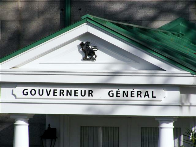 Entré de la résidence du Gouverneur général au Québec